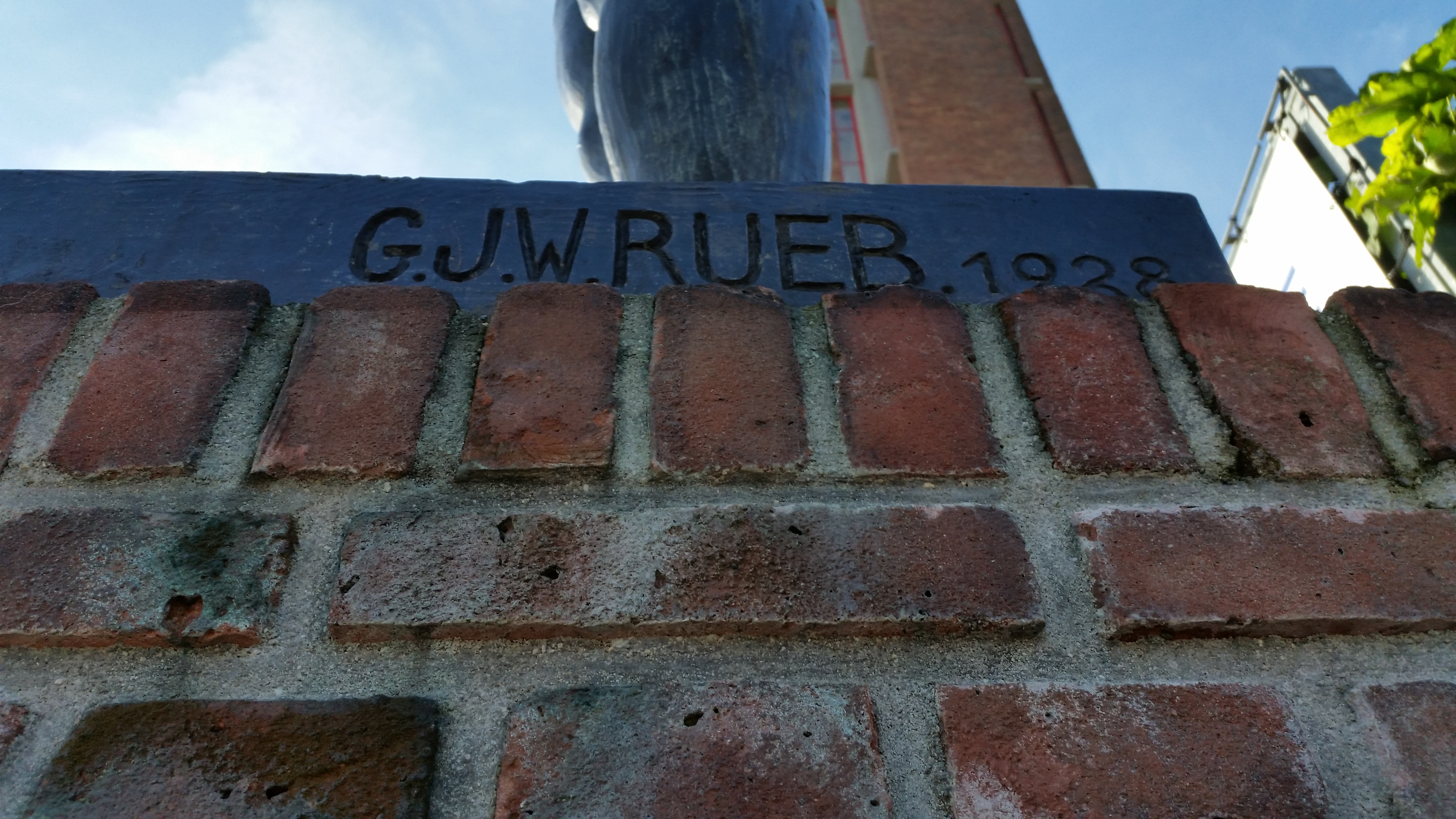 Van Tuyll-monument ofwel De Olympische groet, Stadionplein, naam kunstenares